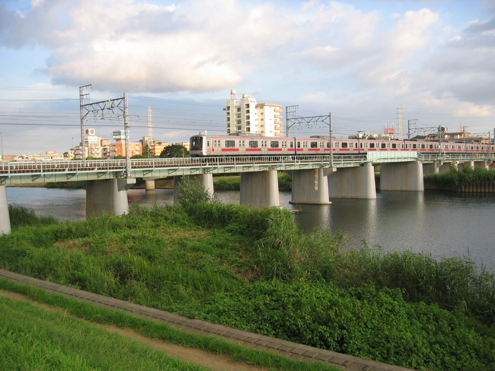 東急東横線